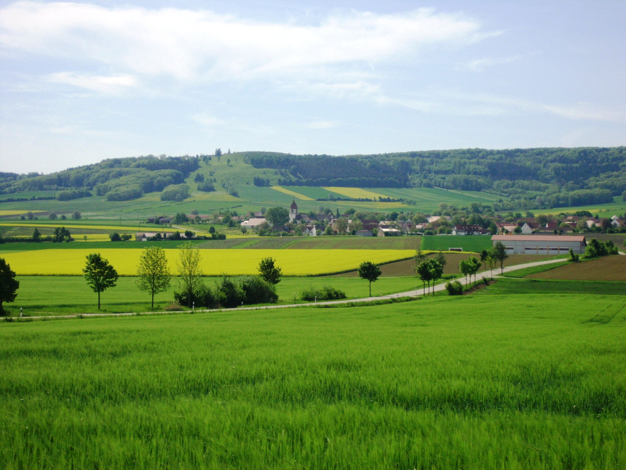 Sammenheim, Ortsteil der Gemeinde Dittenheim im mittelfränkischen Landkreis Weißenburg-Gunzenhausen